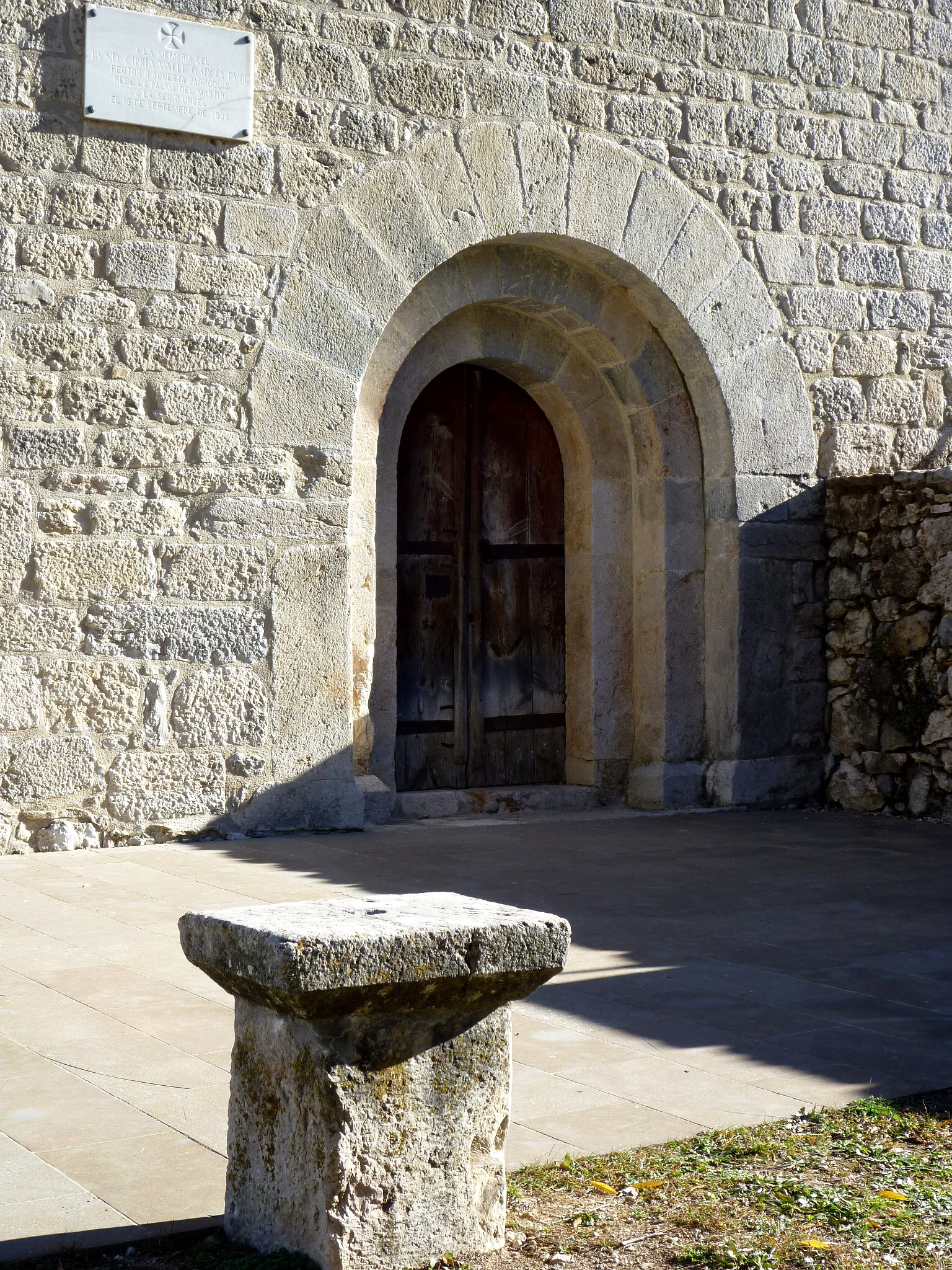 Sant Martí de Cambrils (Odèn): comunidor i portal